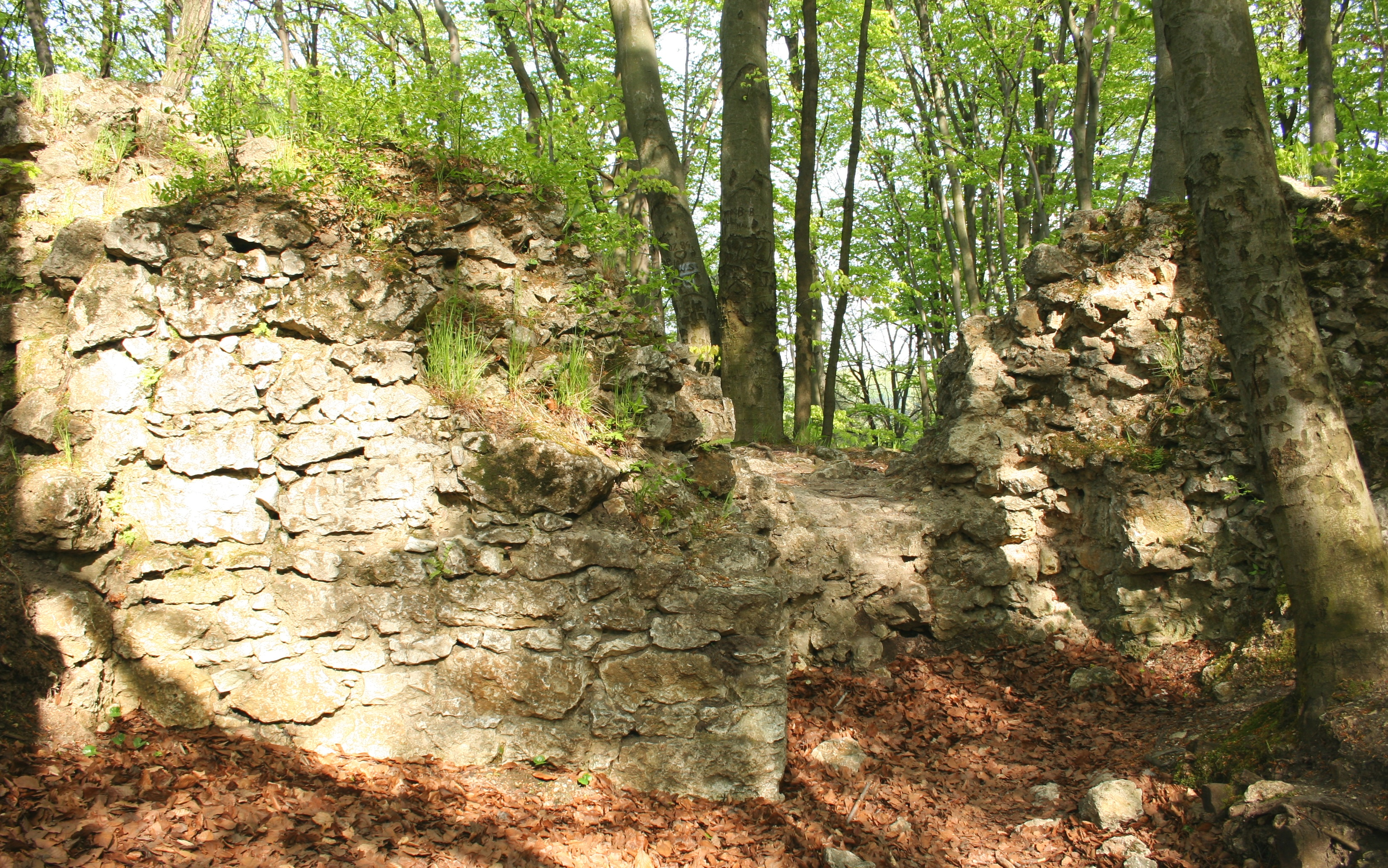 Ruiny zamku w Ostrężniku, Jura Krakowsko-Częstochowska